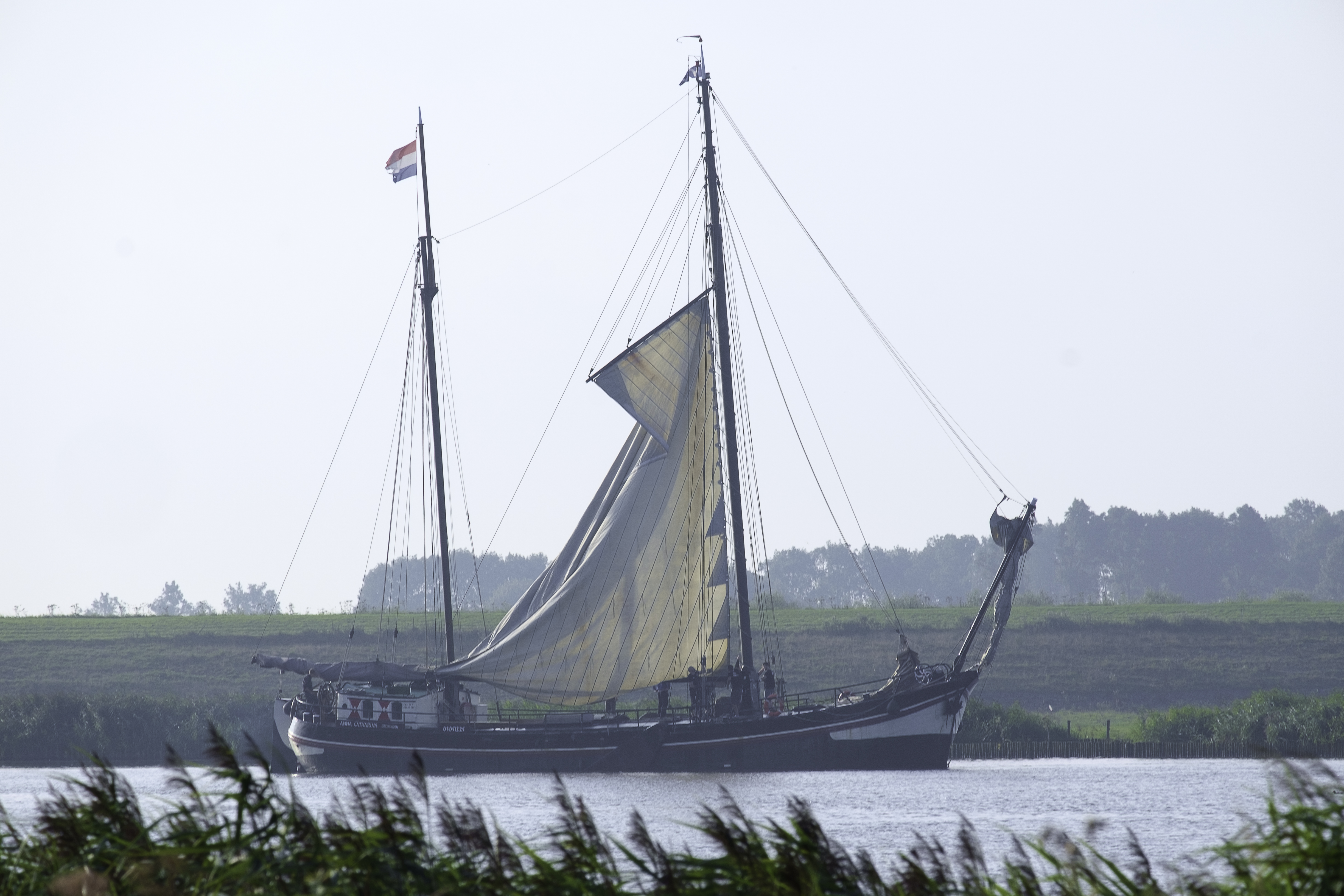 zeilboot Anna Catharina op het Zoutkamperril